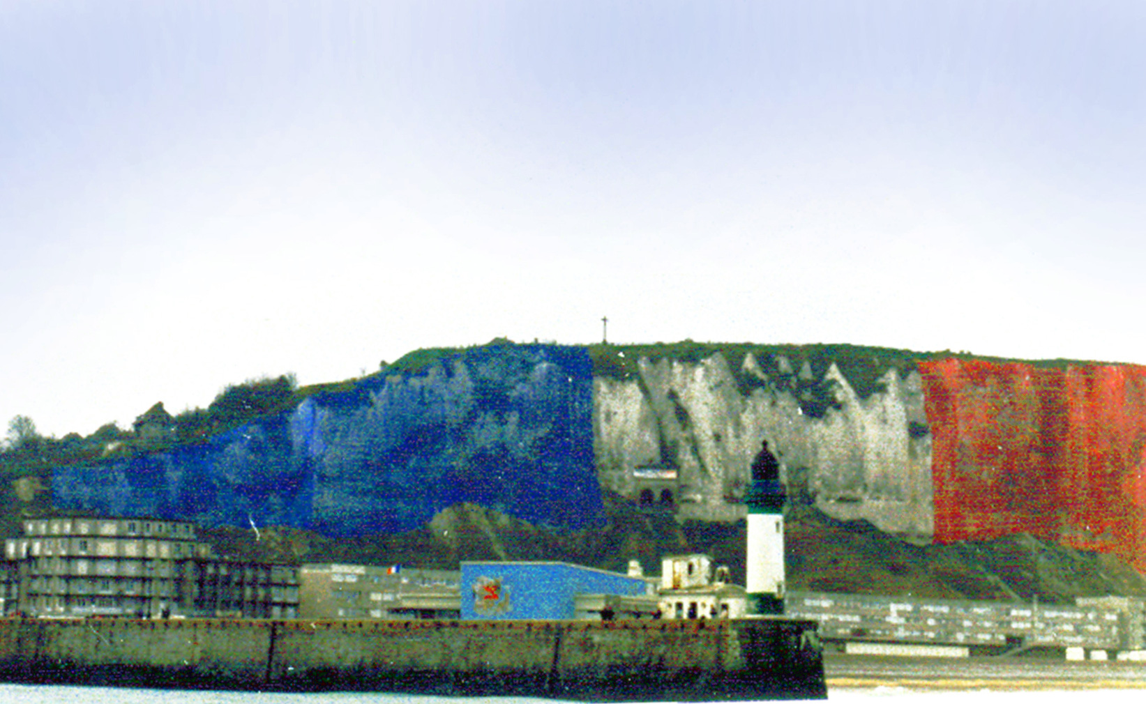 Retouche de l'image File:Falaise tricolore acantilado Normandia.jpg : recadrage, alignement, couleur